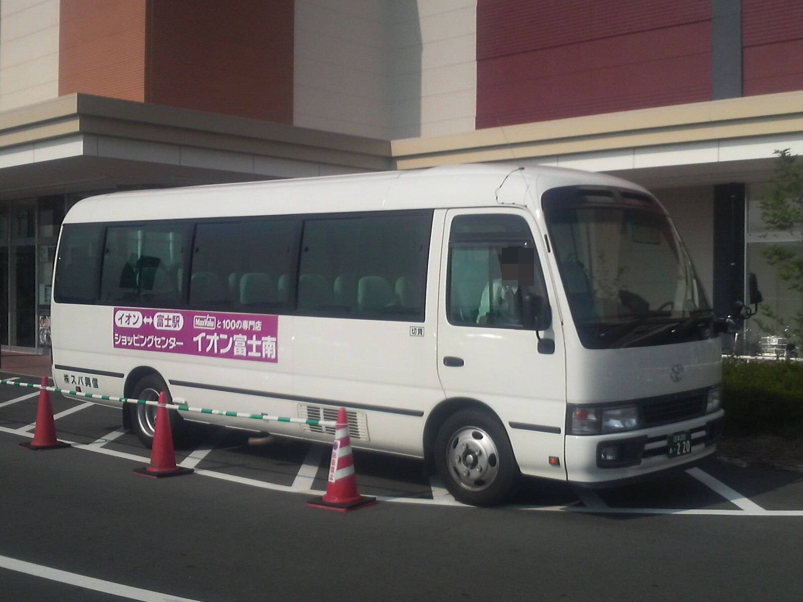 イオン富士南ショッピングセンターシャトルバス富士駅線使用車両